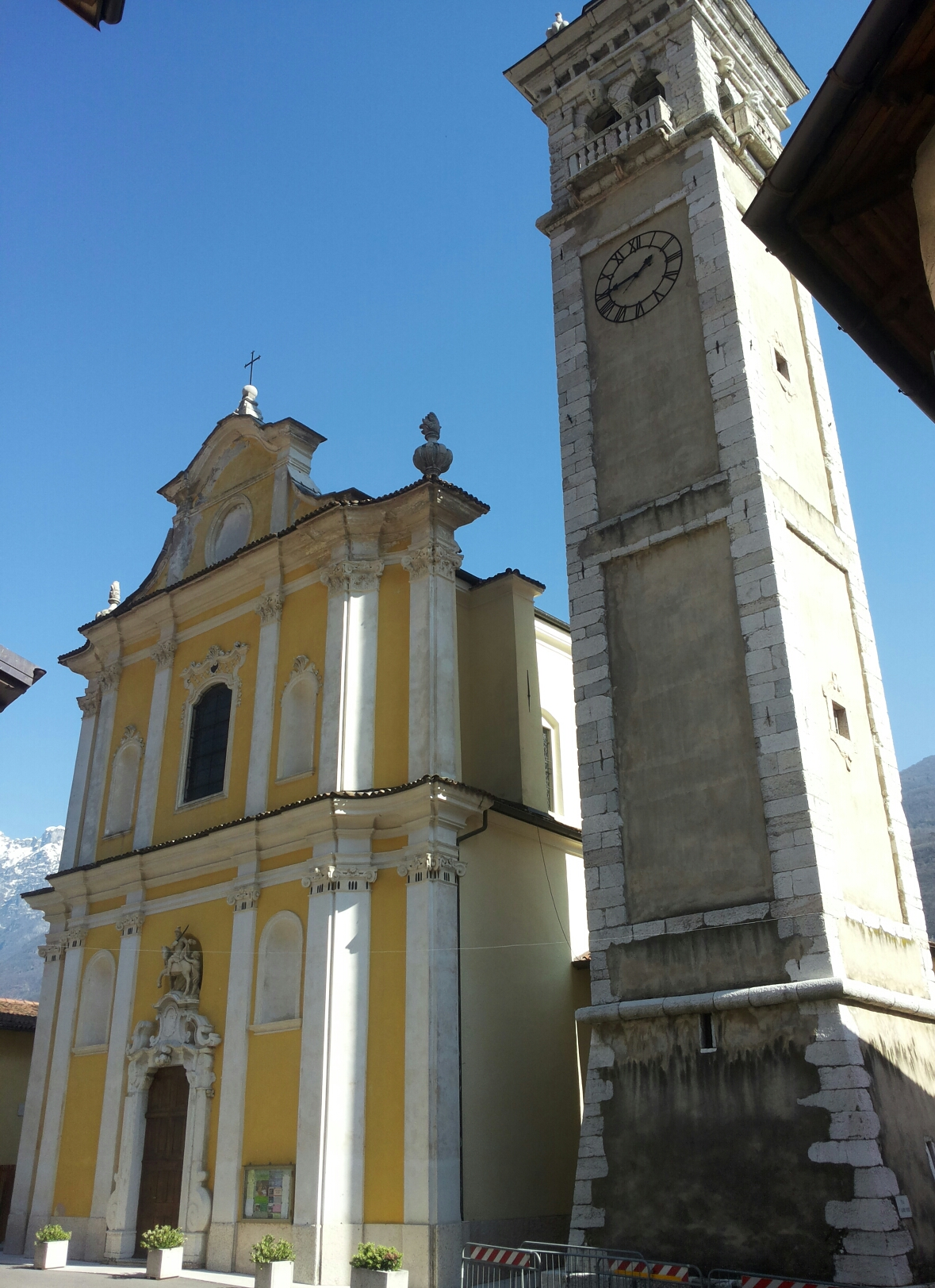 Facciata della chiesa di Pilcante (Ala, Trento)